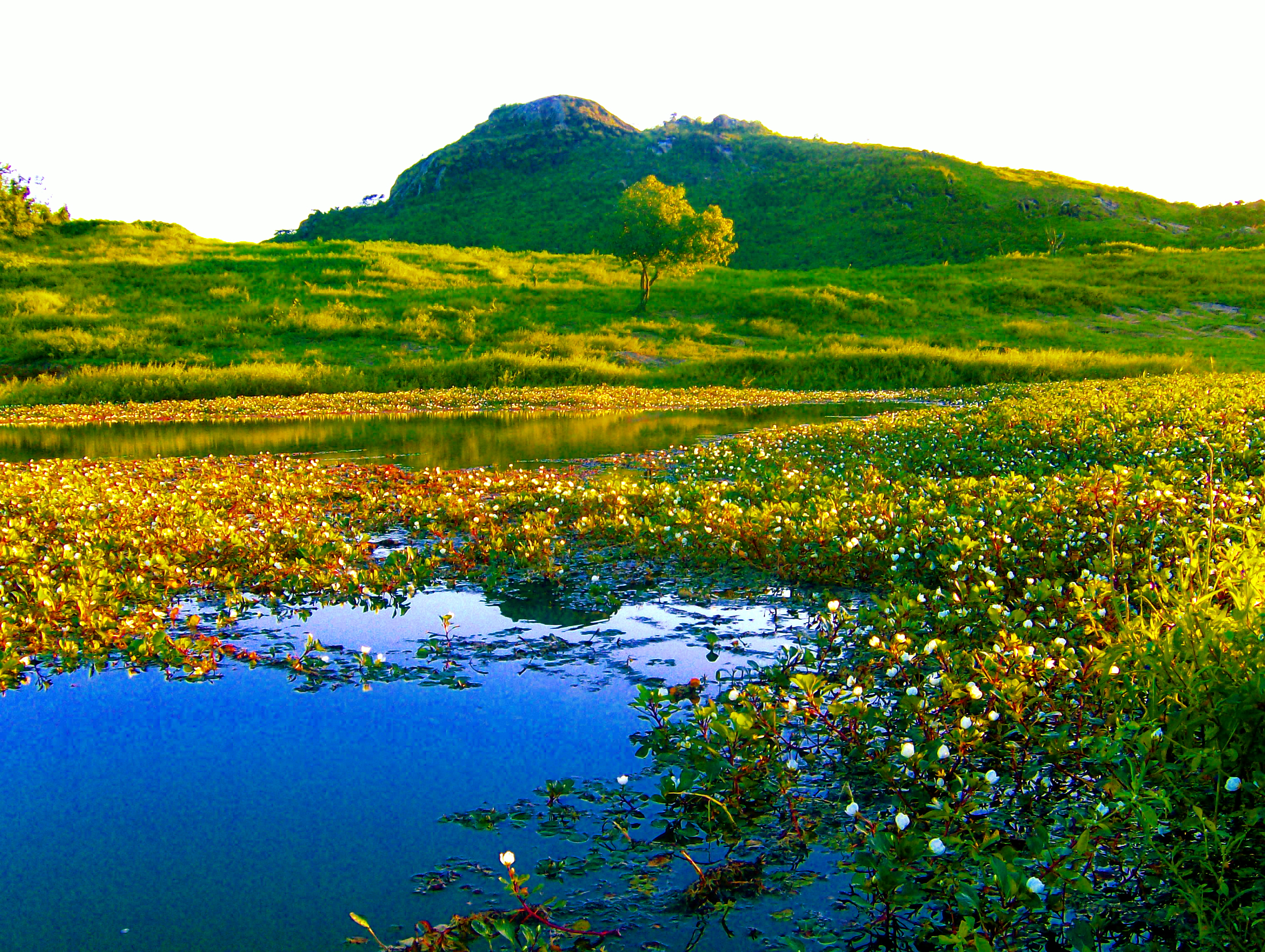 Vista da Pedra do Cordeiro em Belém da Paraíba